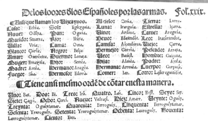 Lucio Marineo Siculo da un glosario vasco y lista de números en De rebus Hispaniae memorabilibus. Español. Obra compuesta por Lucio Marineo Siculo Cronista de sus Magestades de las cosas memorables de España. p. 41